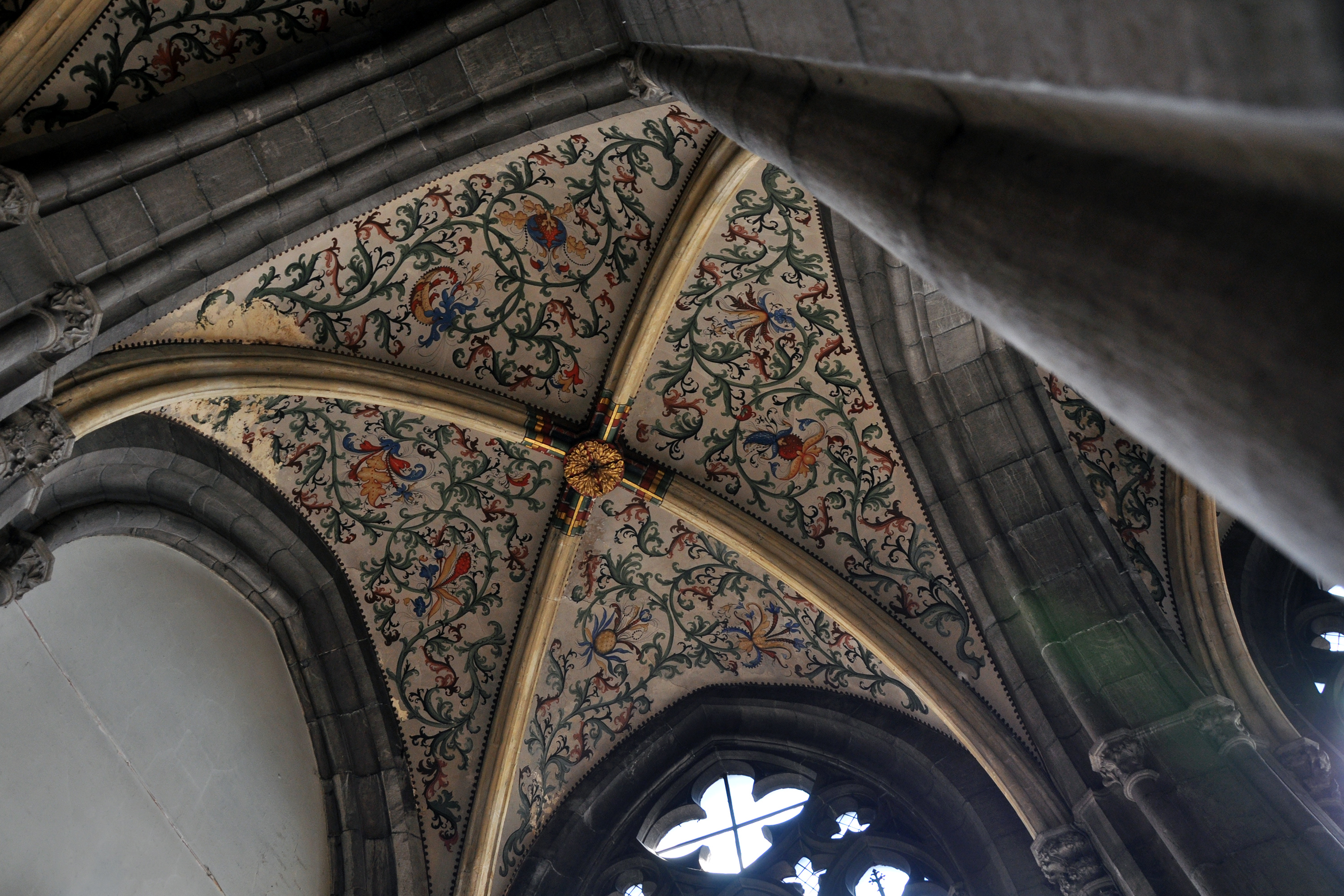 Cathédrale Saint-Paul de Liège: la voûte d'une chapelle.